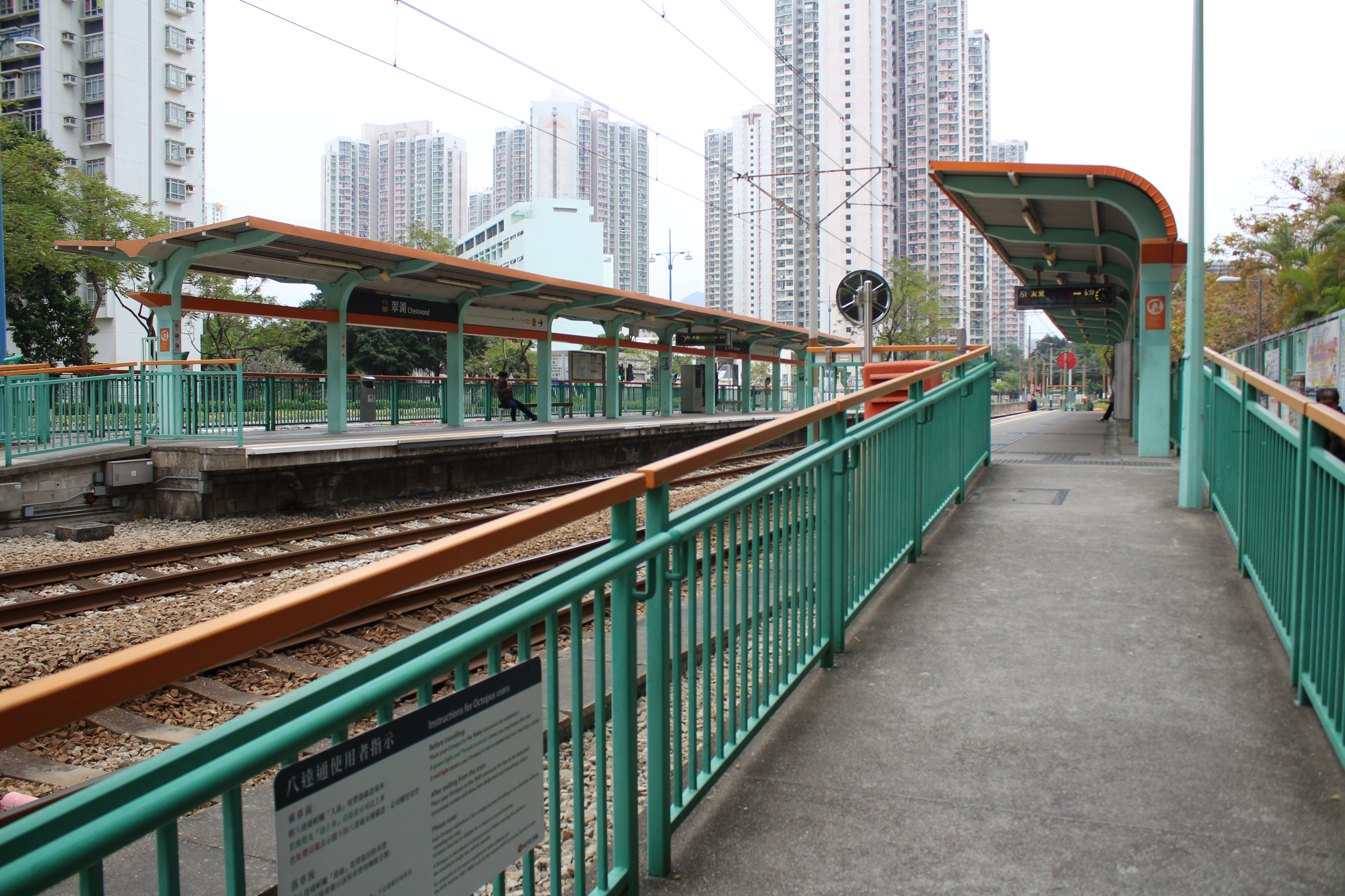 翠湖站月台